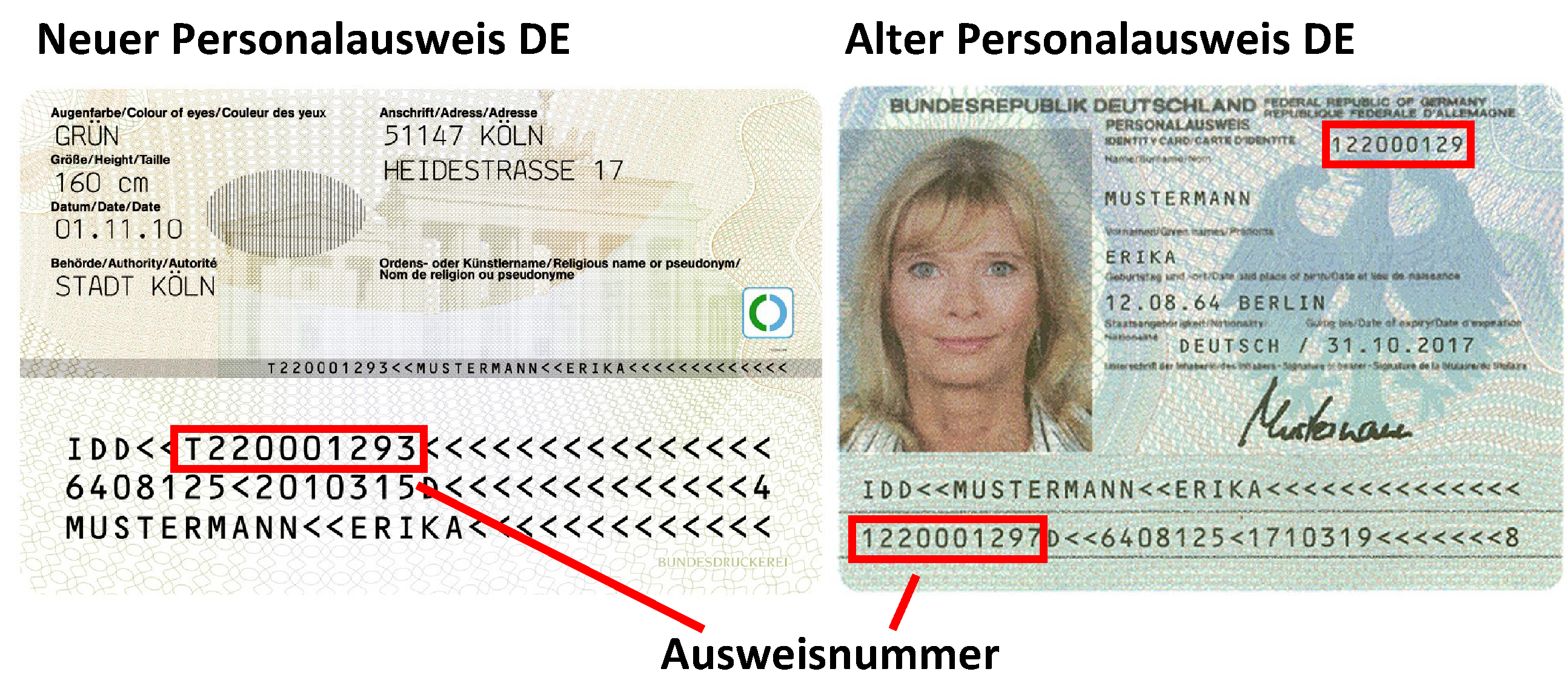 Personalausweisnummer von neuem und altem deutschen Personalausweis